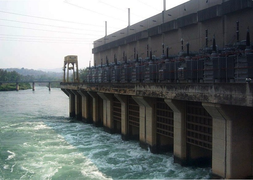 'เขื่อนสิริกิติ์ sirikitdam Uttaradit Thailand